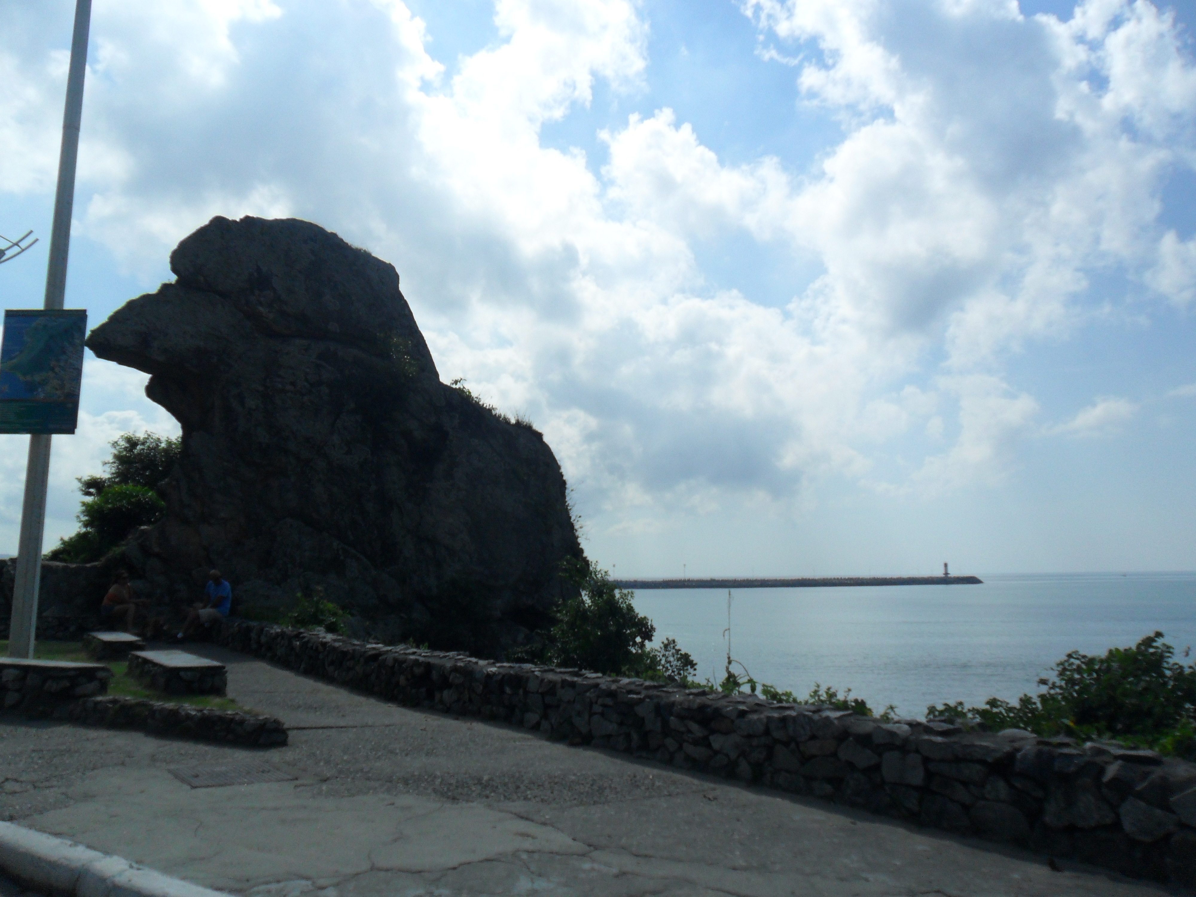 A escultura do Bico do Papagaio, Itajaí, Santa Catarina, Brasil.